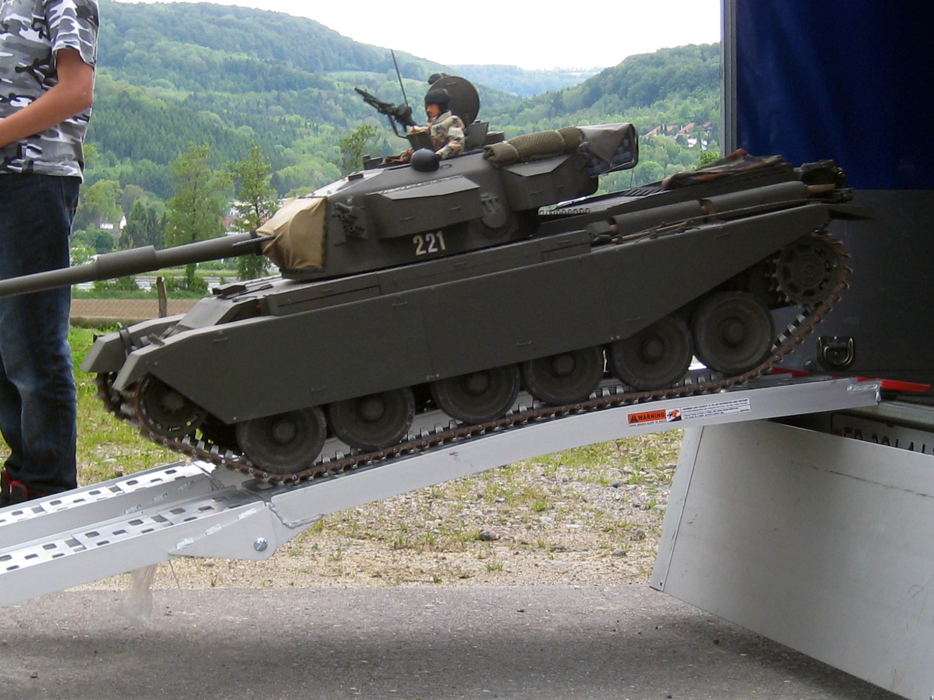 ferngesteuertes Panzermodell Centurion der IG RC Panzer Schweiz beim Militärmuseum Full